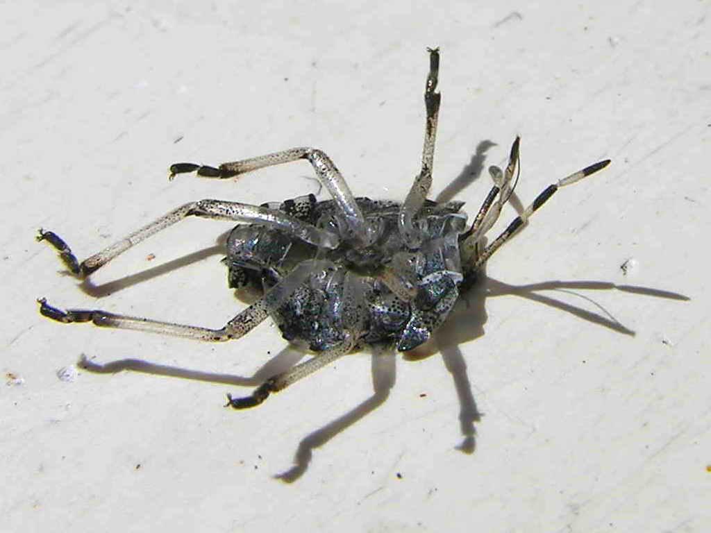 Foto tirada cunha Nikon E8800 Bastabales - Galicia - Spain